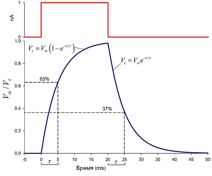 Изменение мембранного потенциала клетки, вызванное прямоугольным импульсом электрического тока